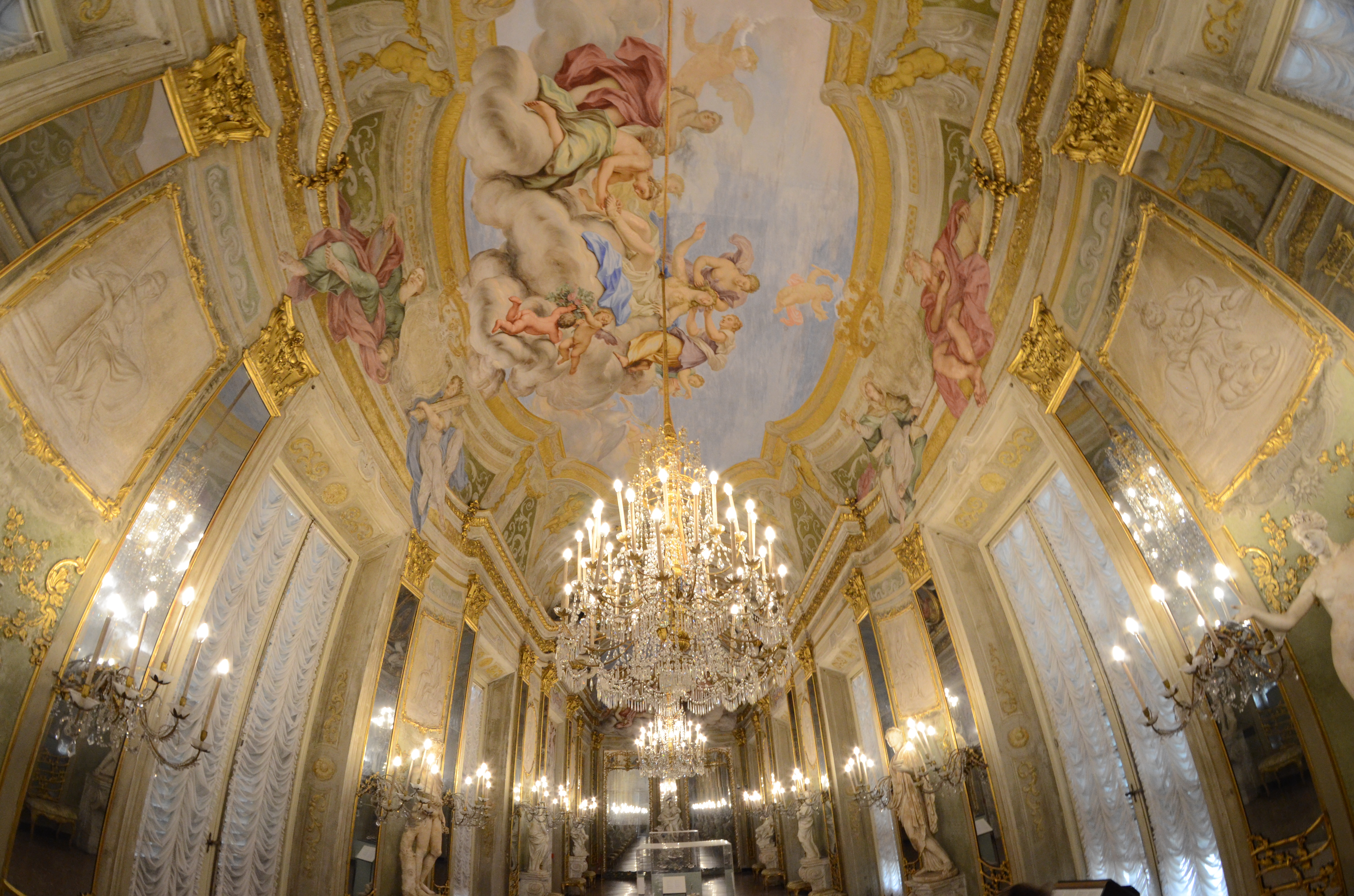 Het interieur van het Palazzo Reale Genova